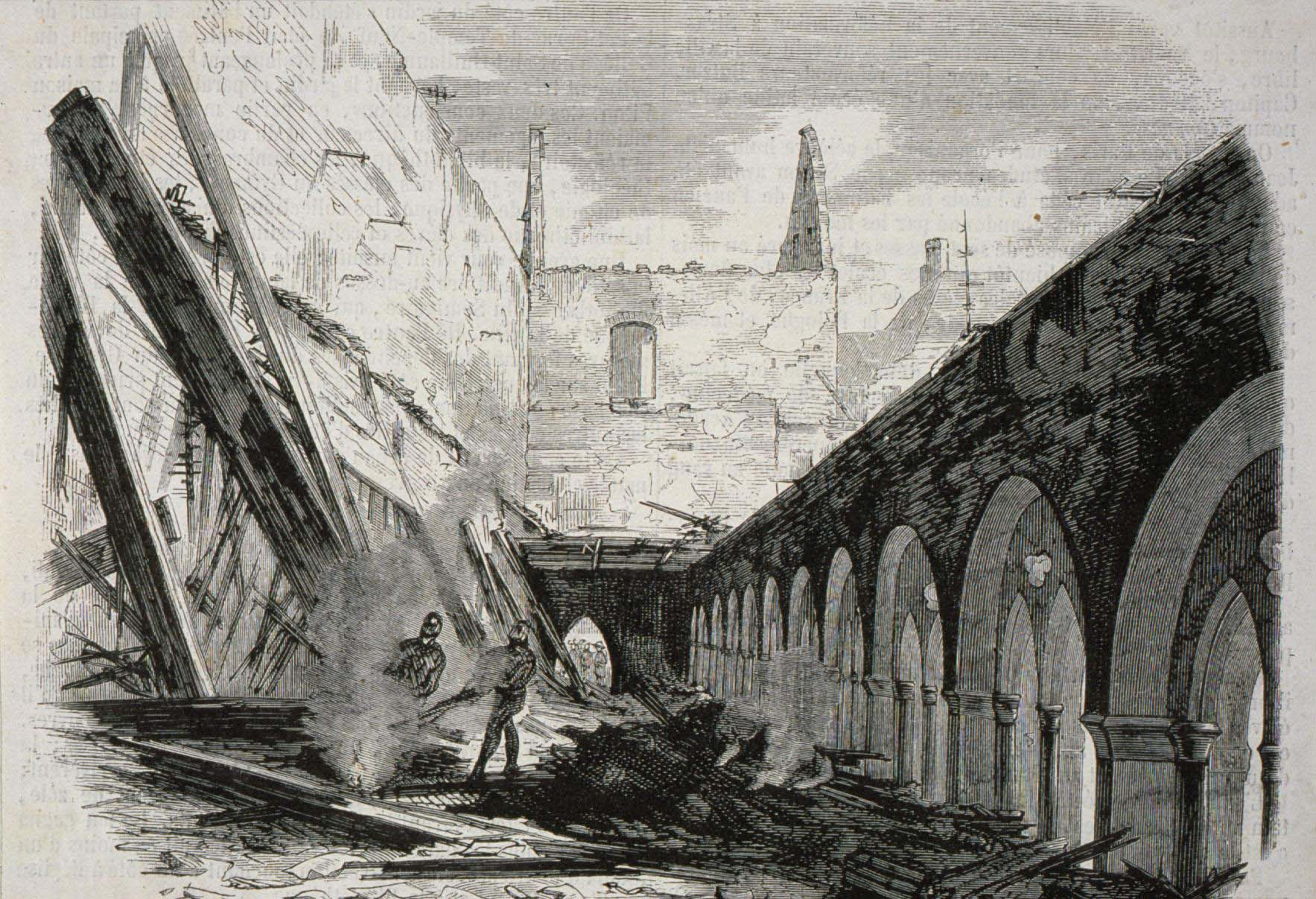 Illustration représentant l'incendie du Gymnase protestant de Strasbourg en 1860.